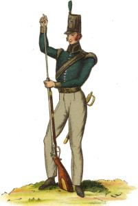 Soldat des 1. leichten Bataillons der King's German Legion, zeitgenössische Darstellung